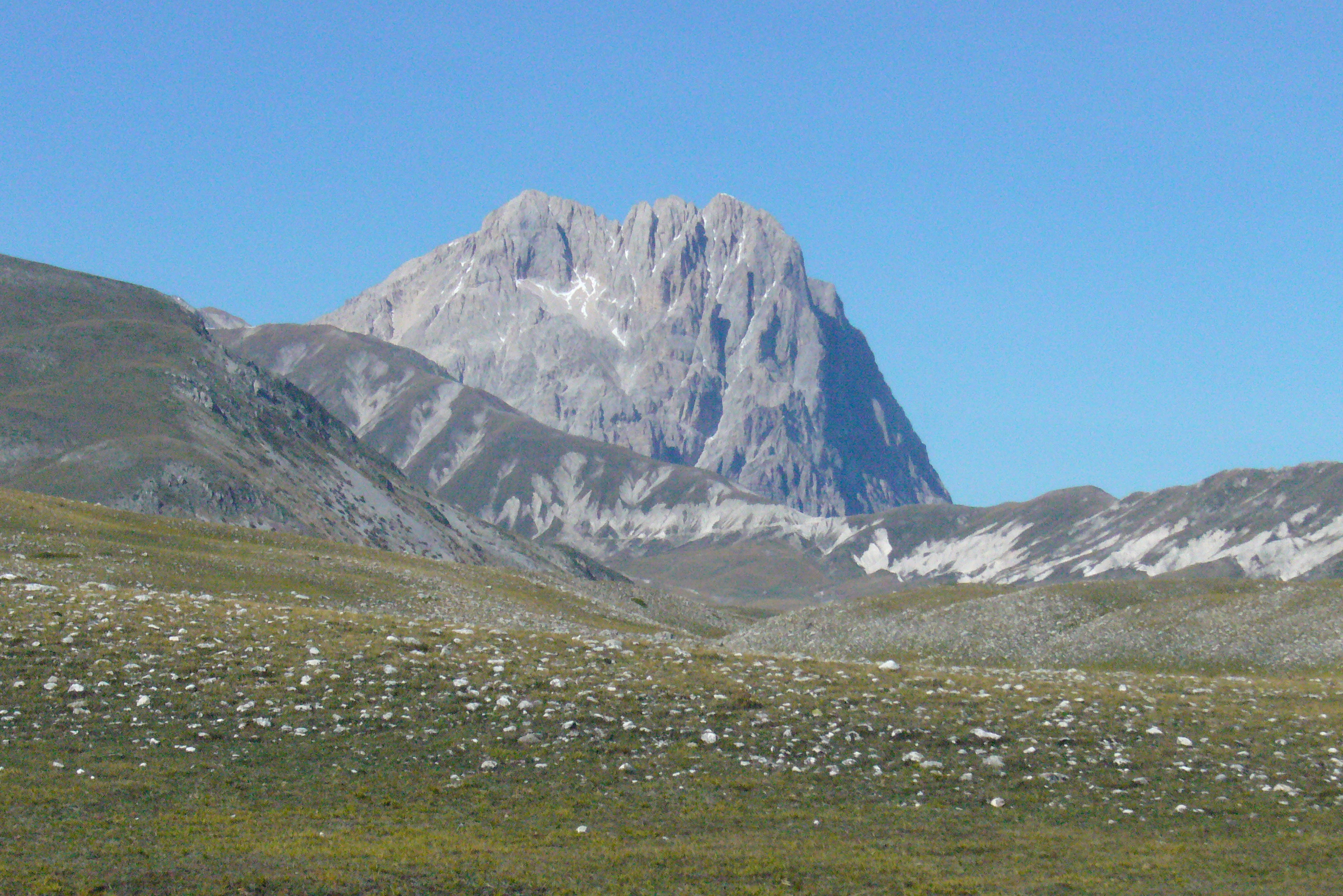 Gran Sasso Corno Grande